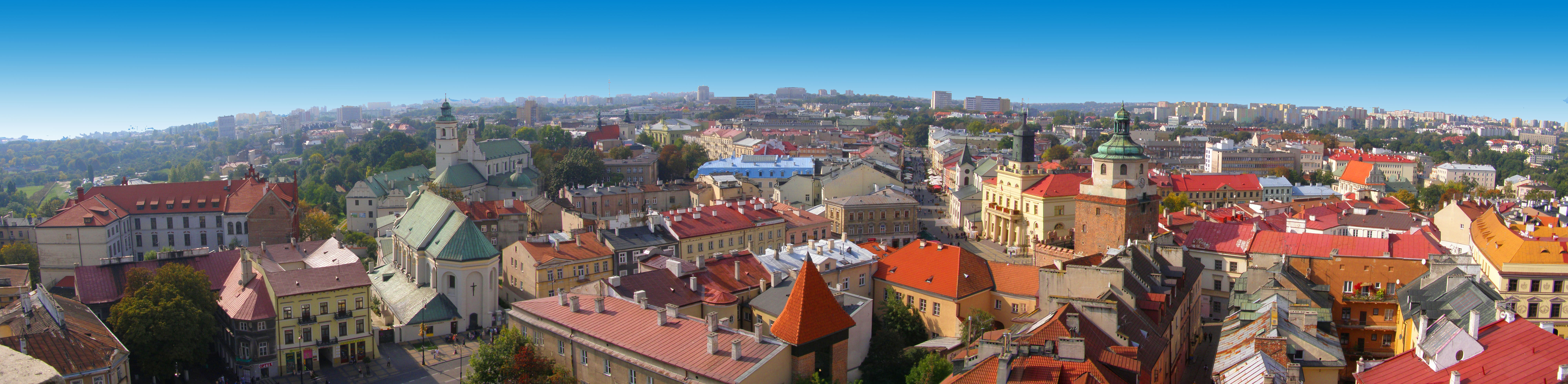 Panorama Lublina z Wieży Trynitarskiej